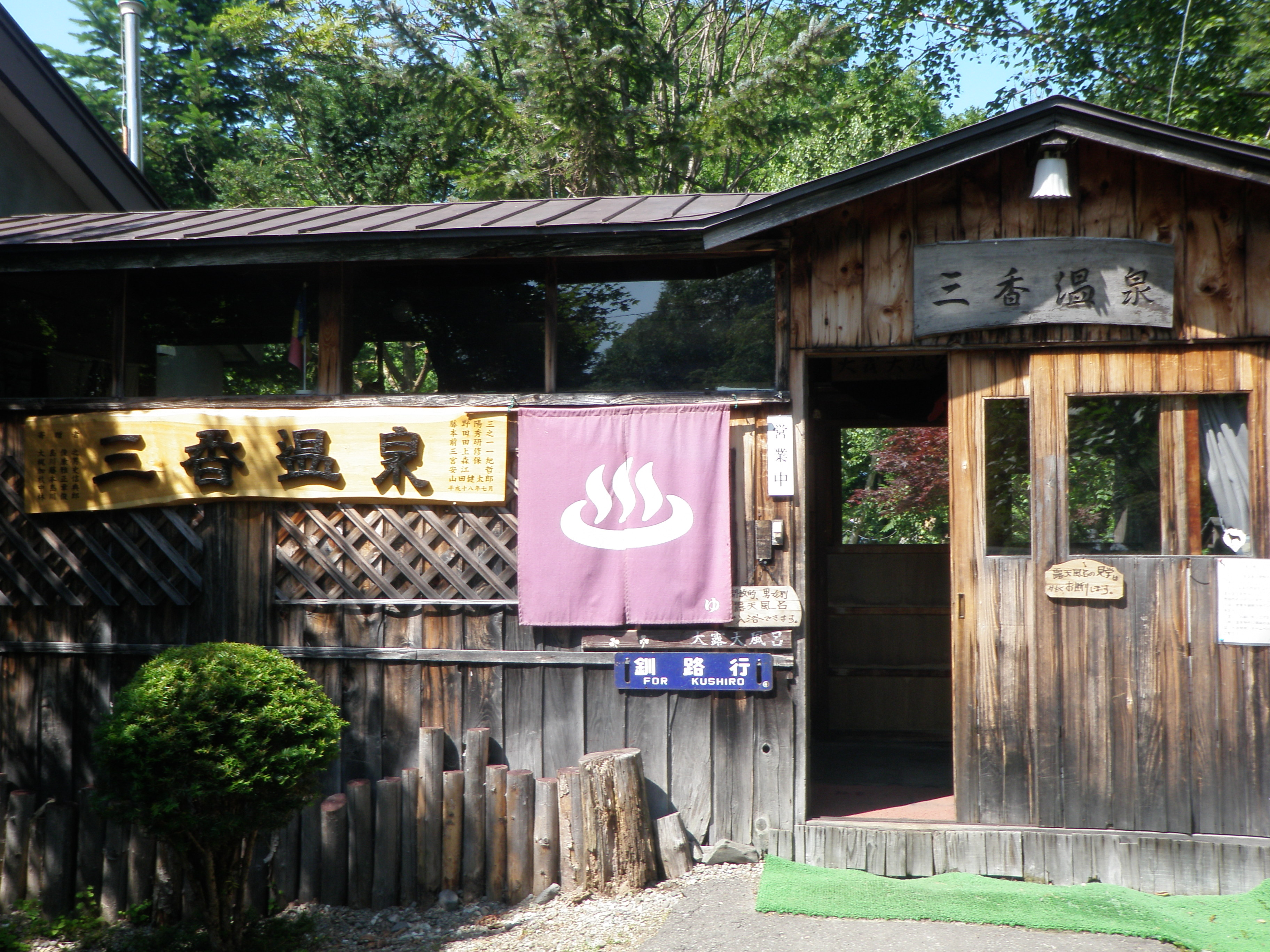 三香温泉入口